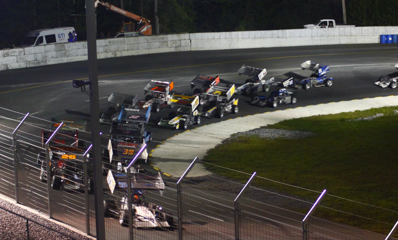 International SuperModified Association à l'Autodrome Chaudière le 22 juin 2013 - Photo Paul-Émile Poulin-Jacques